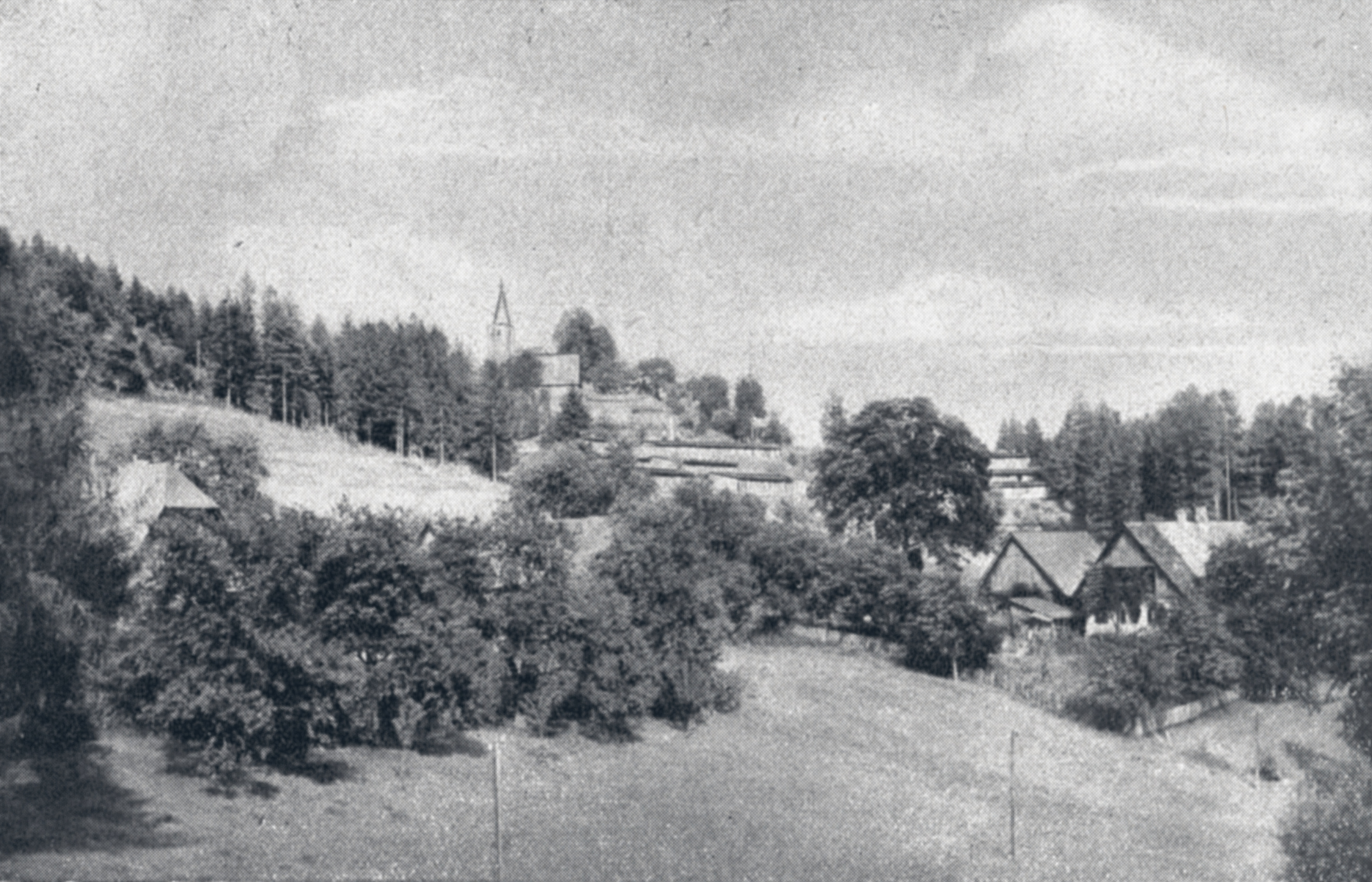 Baracken des Reichsarbeitsdienst-Lagers St. Oswald in Freiland, Steiermark. Oben die Kirche St. Oswald (mit Dach des Wirtschaftsgebäudes), rechts der Gasthof „Triftweber“ (noch mit dem später abgerissenen Wirtschaftsgebäude, das sich auf der Straßentrasse der späteren Hebalmstraße befand). Links das Anwesen „Triftschuster“ (später Pension Hubertus, Gemischtwarenhandlung Familie Kargl). Im Vordergrund die Masten der Telefonleitung von Deutschlandsberg zum Forsthaus Hebalm des Malteser-Ritterordens, der damals den einzigen Telefonanschluss im Koralmgebiet westlich des Ortes besaß.